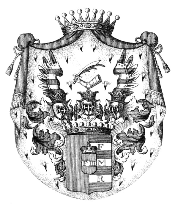 Wappen der Grafen Czernin von Chudenitz (ältere Linie) - Tyroff AT.jpg